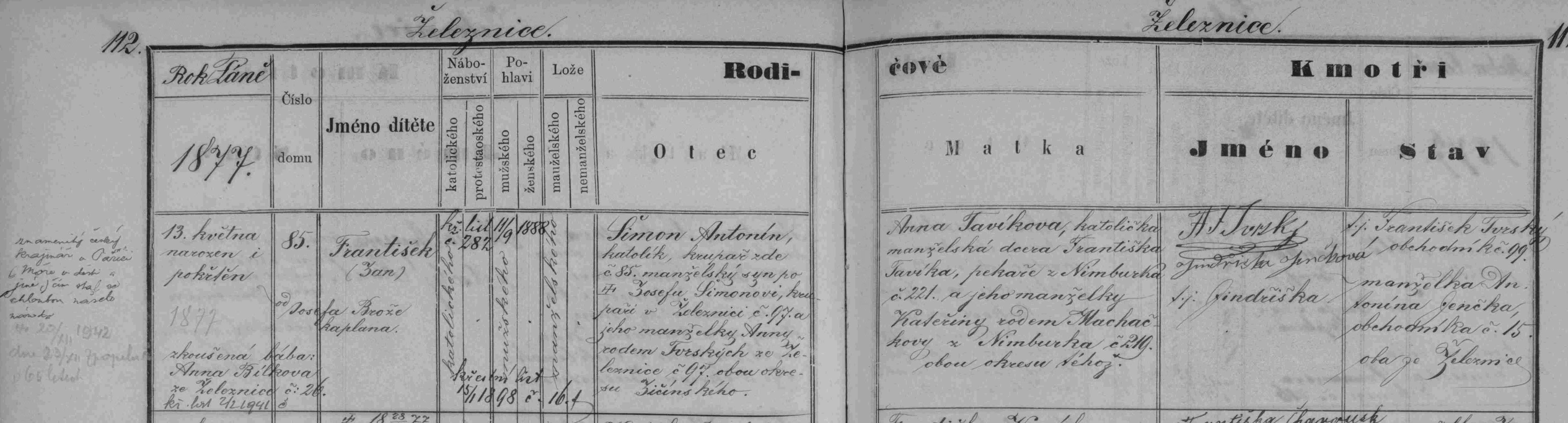 matriční zápis o narození a křtu Františka Šimona (matrika N index N 1870-1900 Železnice (SOA Zámrsk))